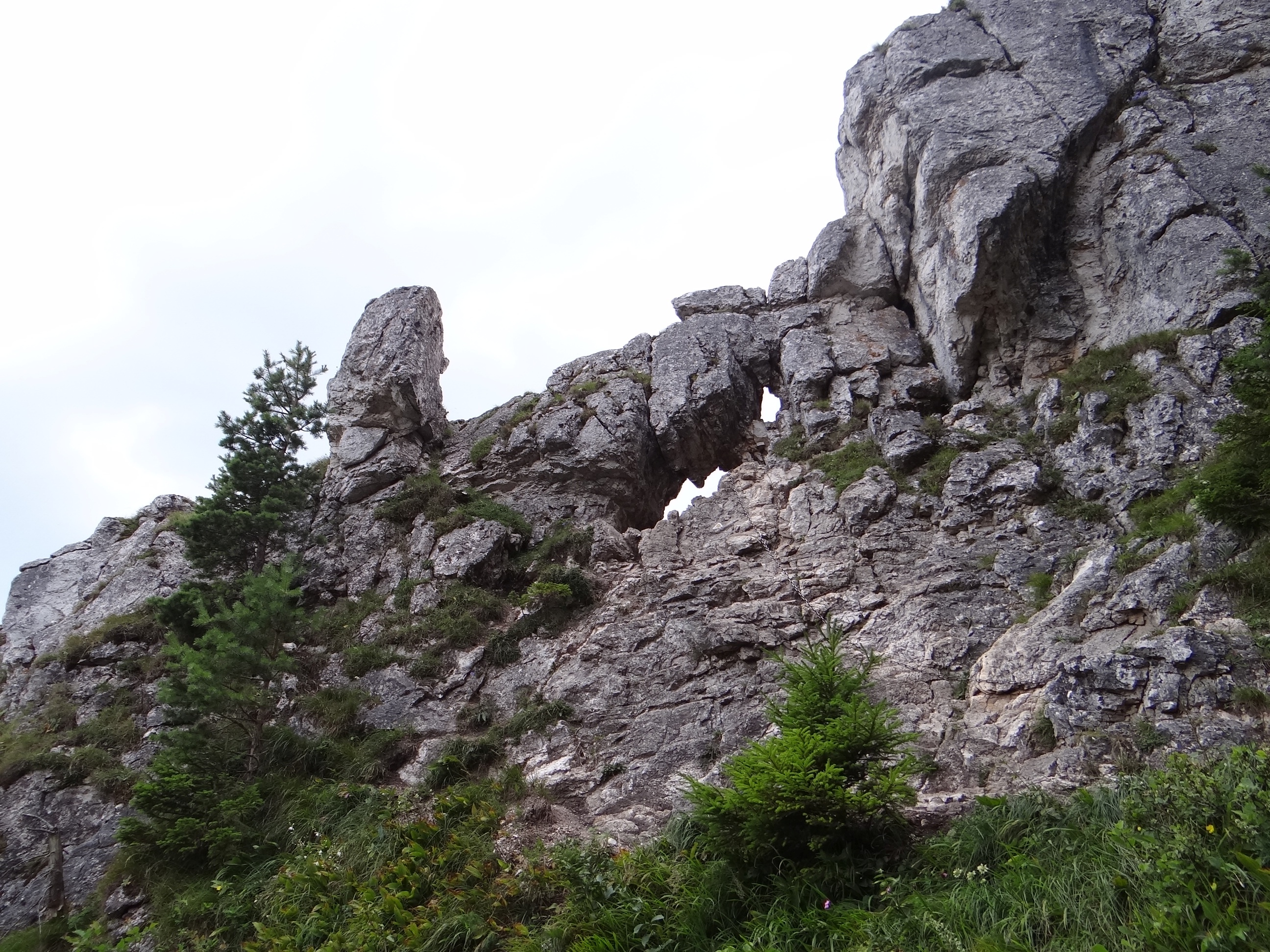 Ostrá (Veľká Fatra). Okno skalne